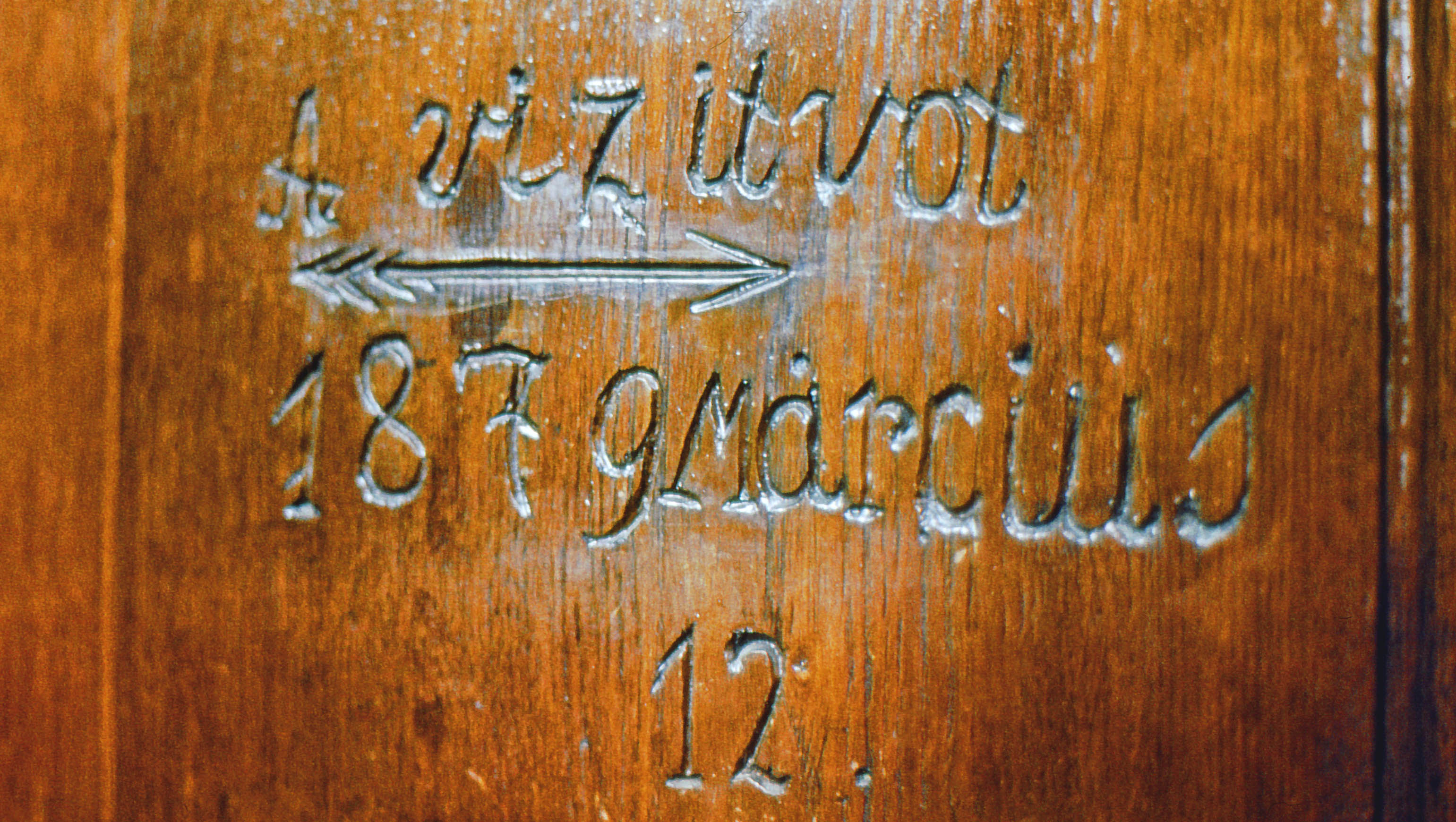 Szeged, az árvíz színtjele, a Mátyás téri templom belső ajtaján. Forrás (a fájl leírása a magyar Wikipédiában szerint): user / szerkesztő Takkk saját diafelvétele 1978, szekennelte szerkesztő Takkk 2008